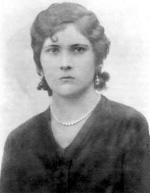 Ma de la Luz Cirenia Camacho González